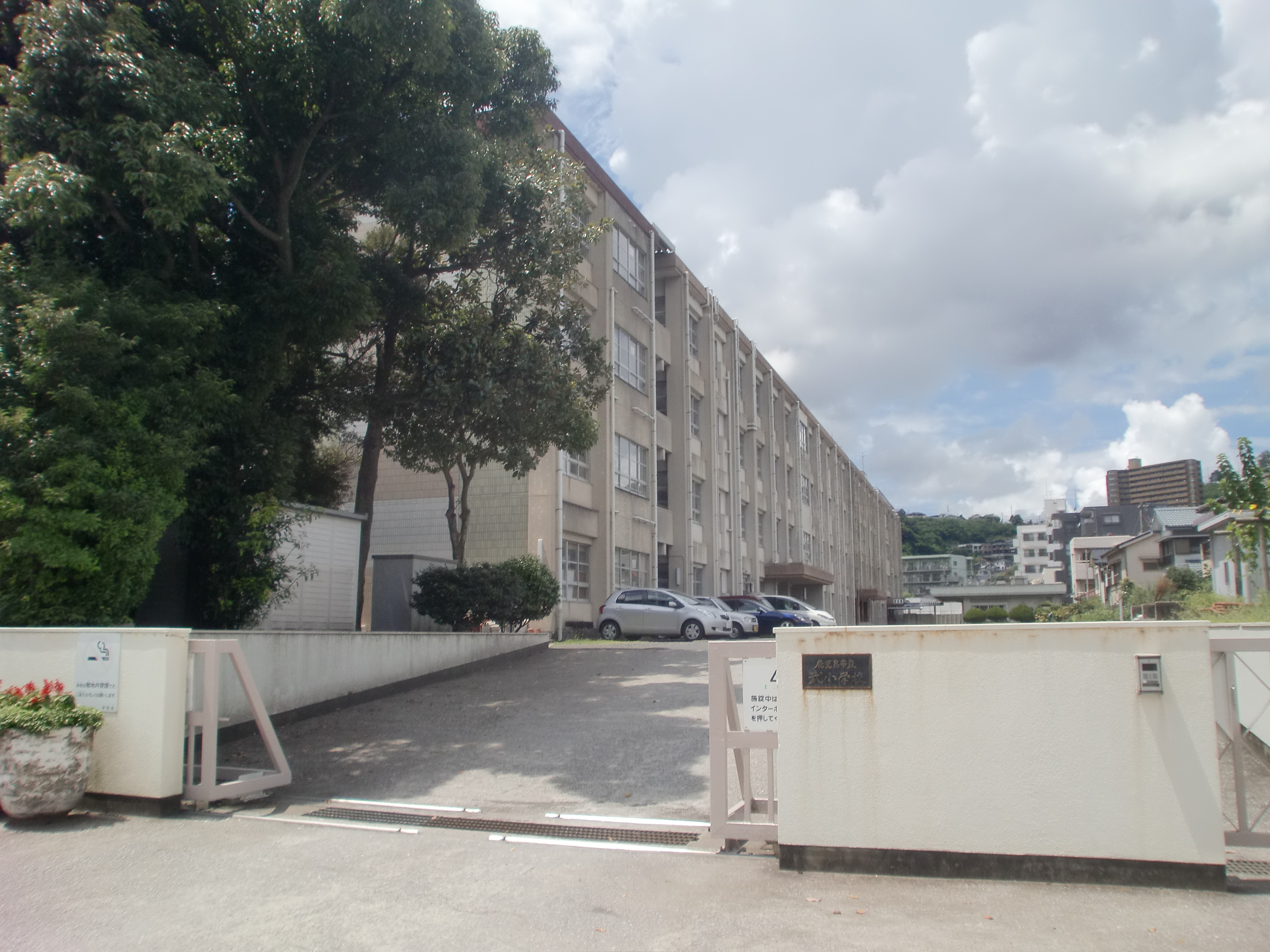 鹿児島市立武小学校の外観。